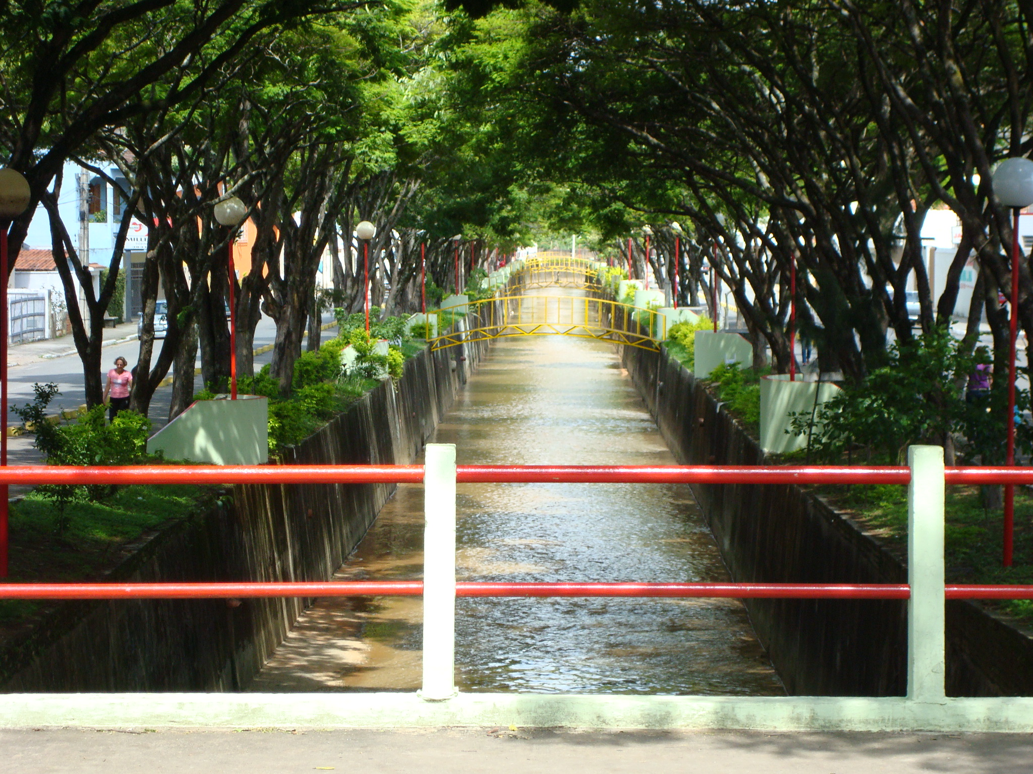 ribeirão São João